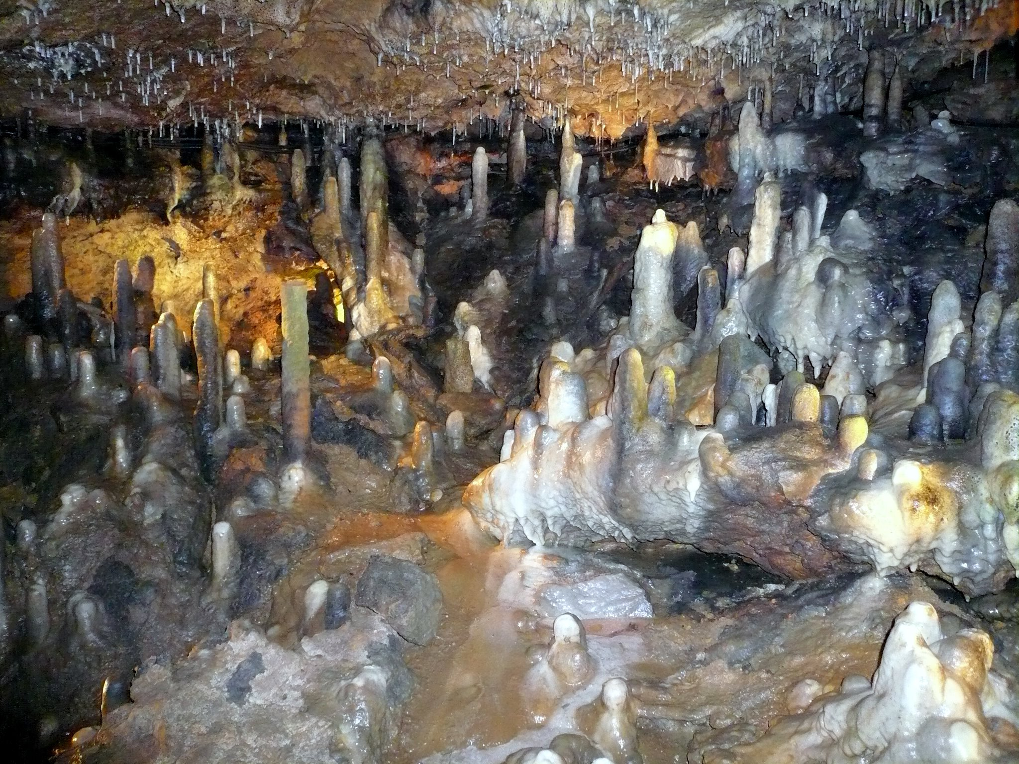 Sophienhöhle, Orientalische Stadt